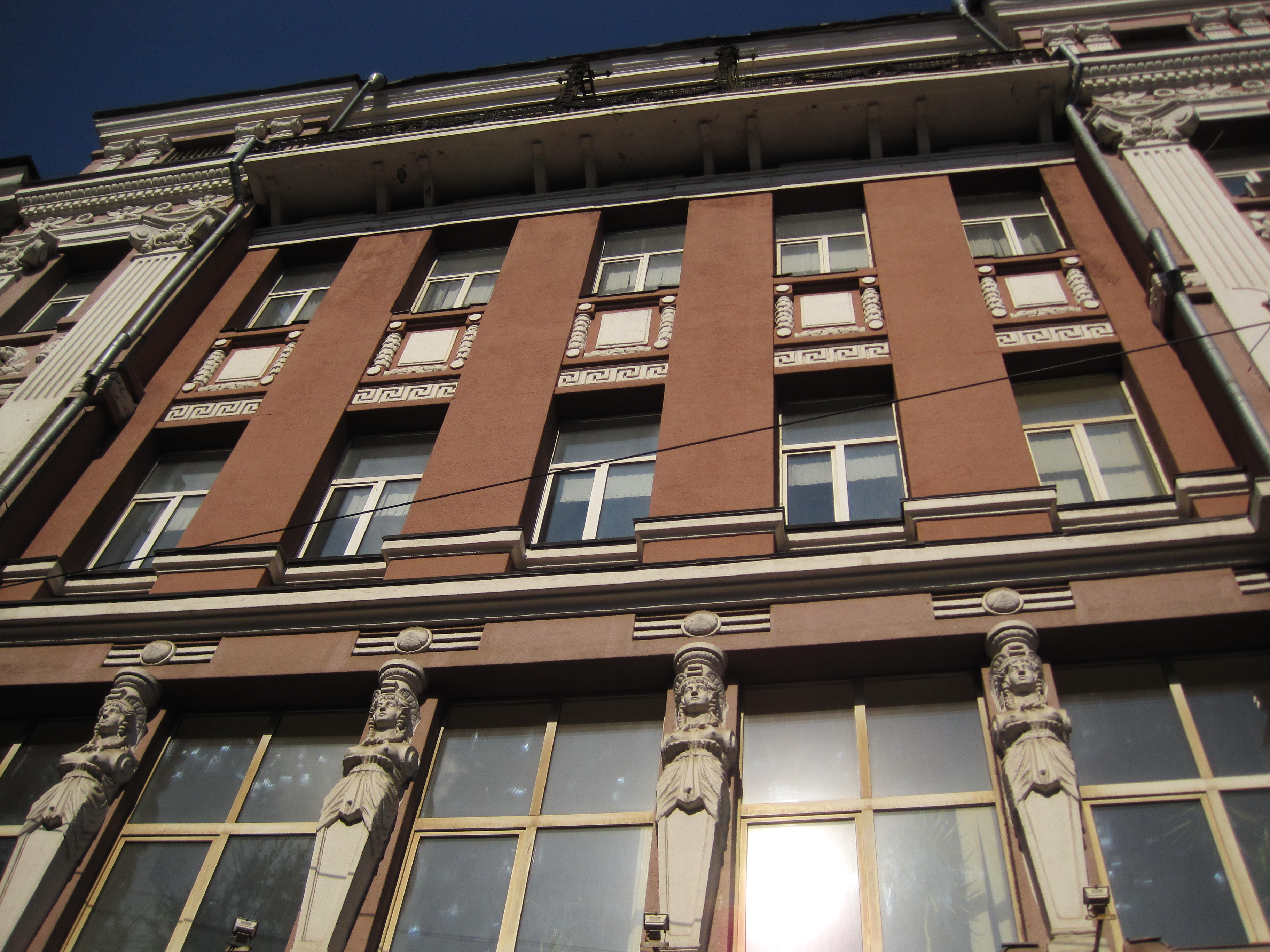 здание доходного дома Черного, фасад